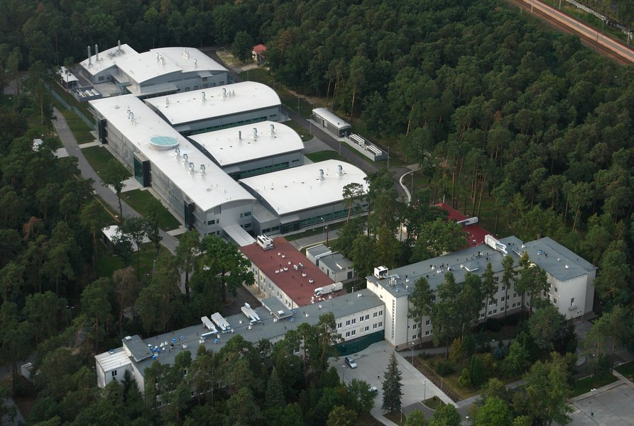 Budynki Państwowego Instytutu Weterynaryjnego - Państwowego Instytutu Badawczego w Puławach